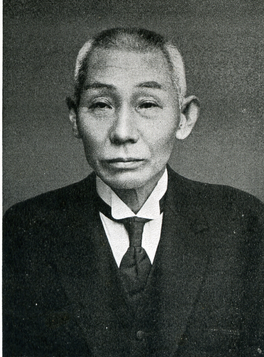 この写真は、田口文次（1868-1940）の写真です。